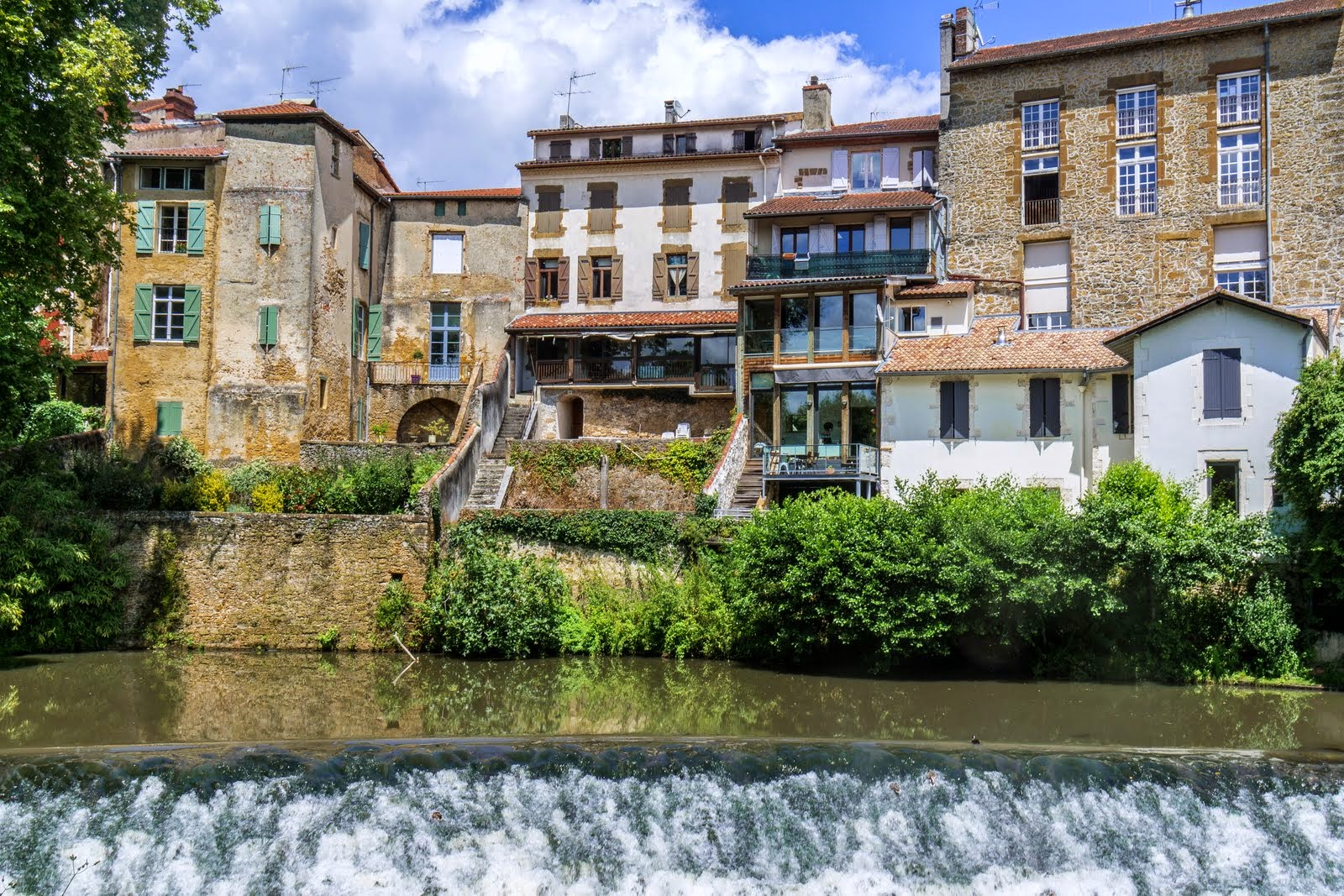 40000 Mont-de-Marsan, France